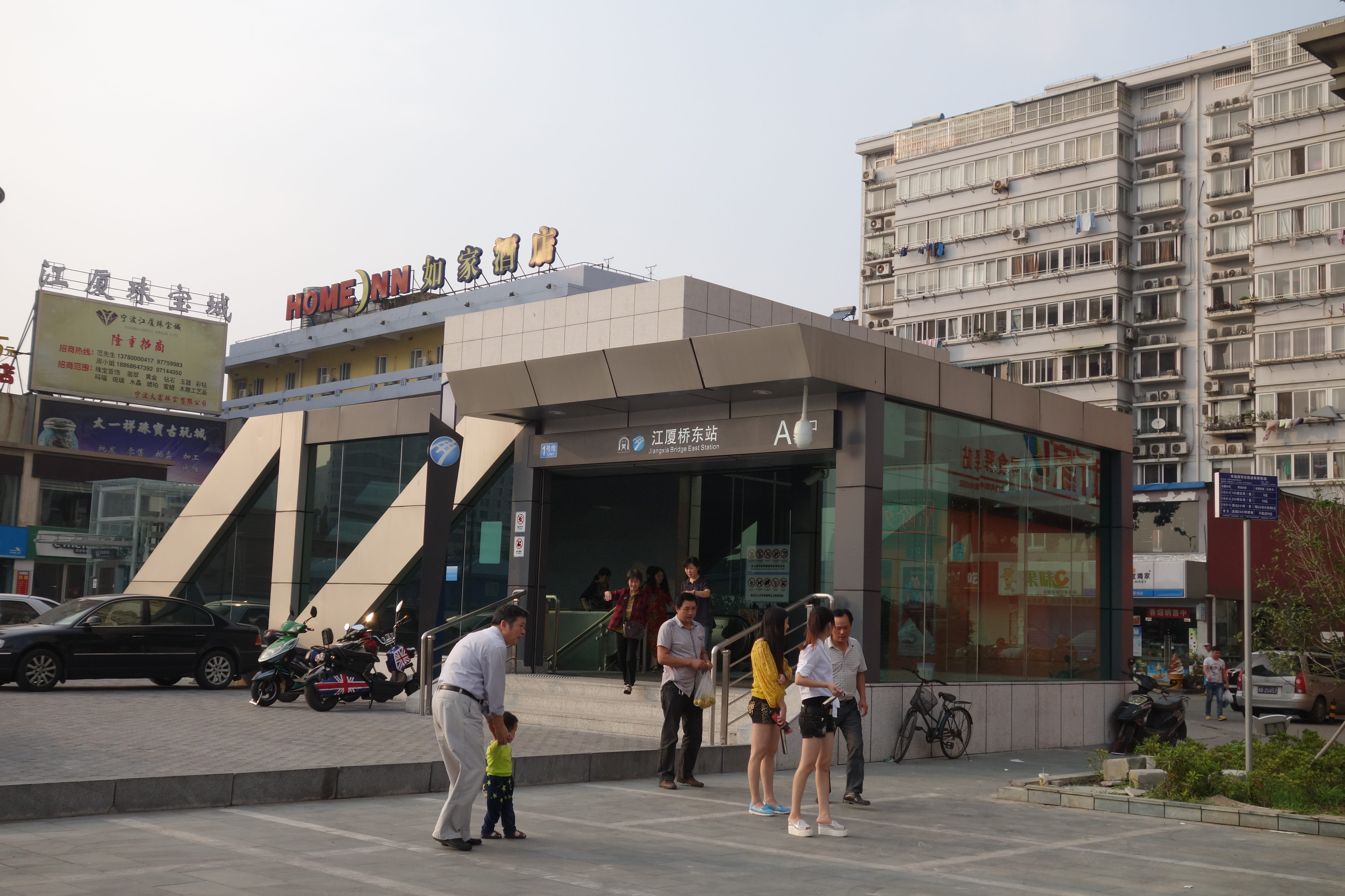 宁波轨道交通江厦桥东站